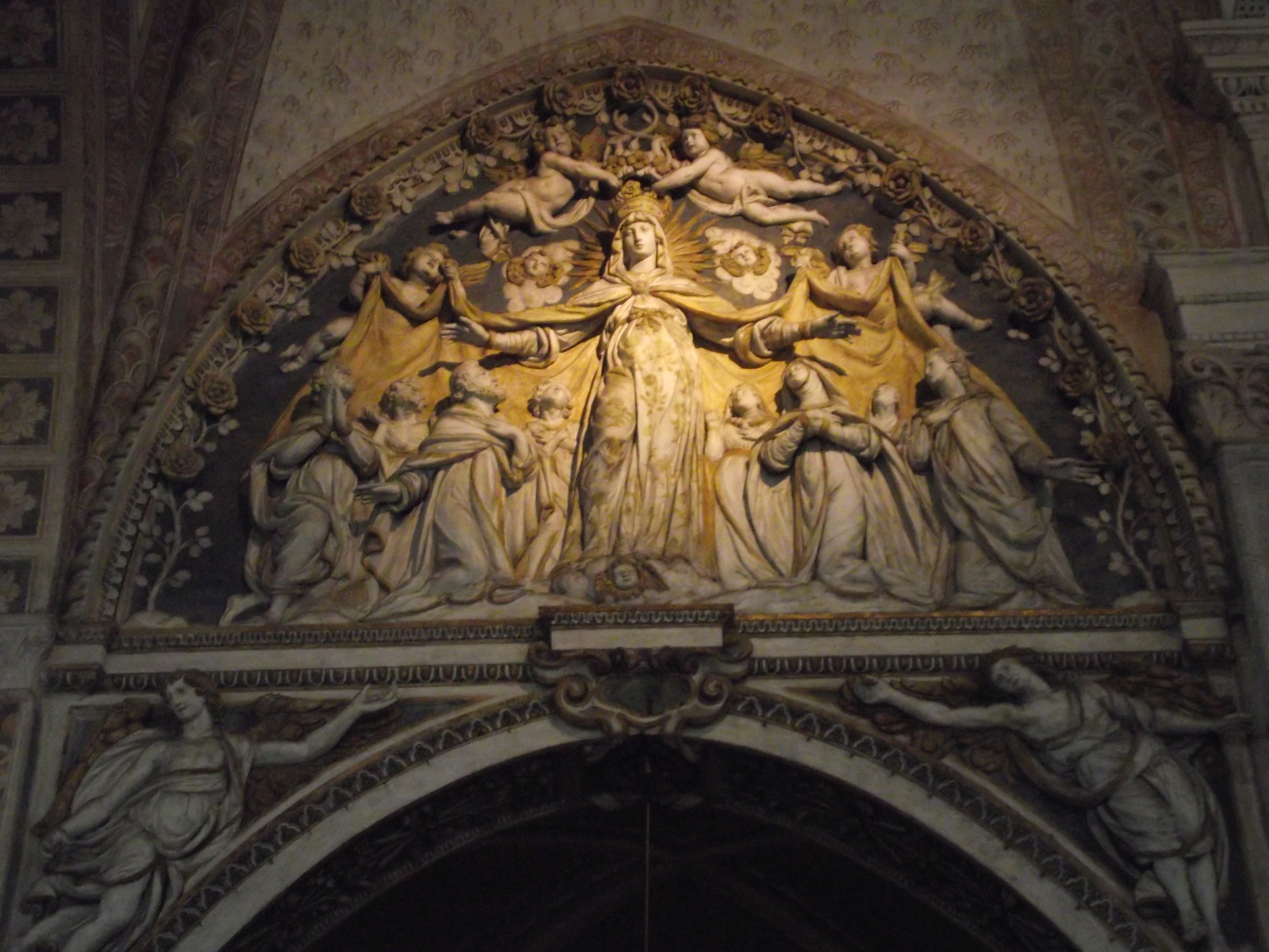 Timpano dell'"Incoronazione della Vergine".